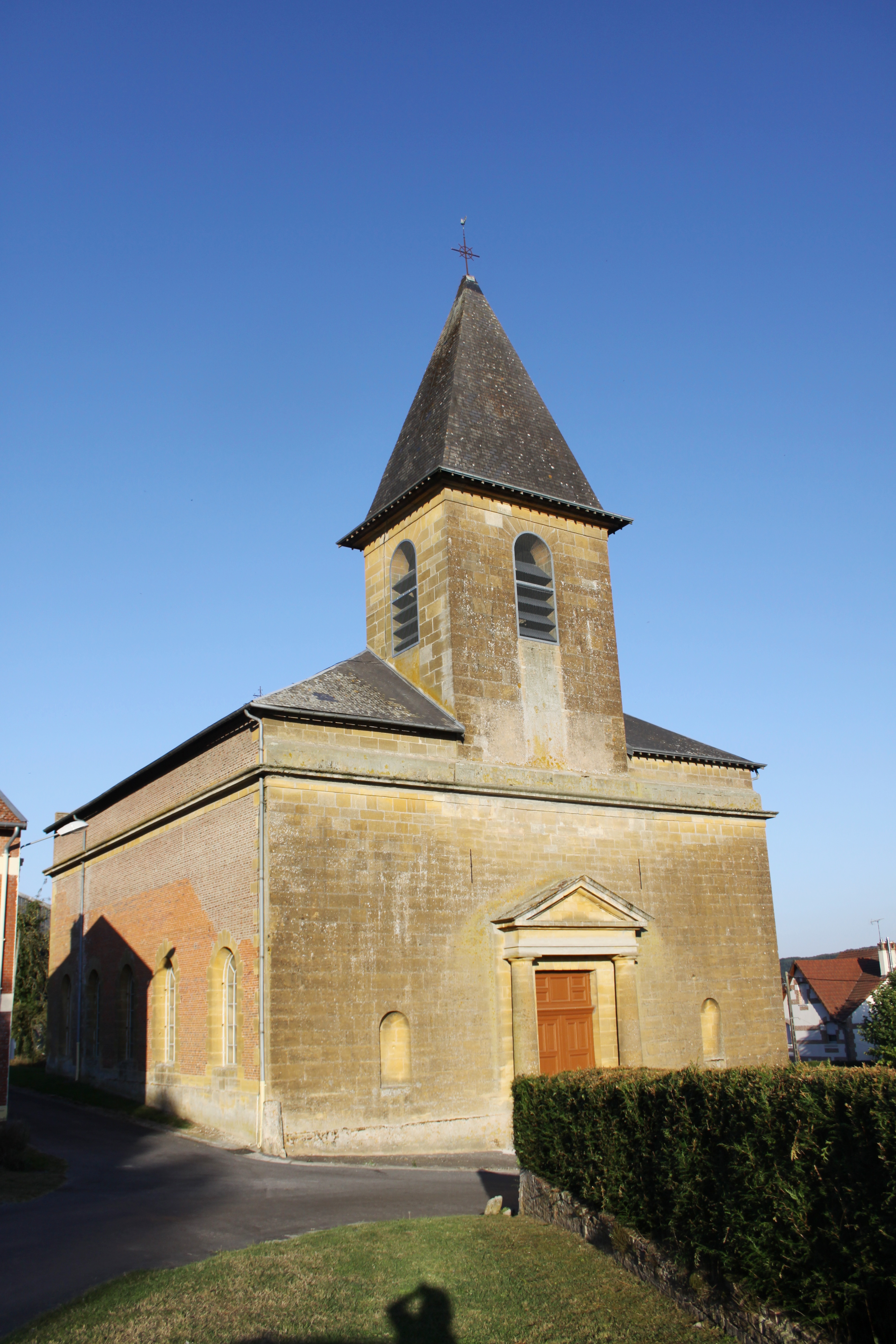 Village Ardennais